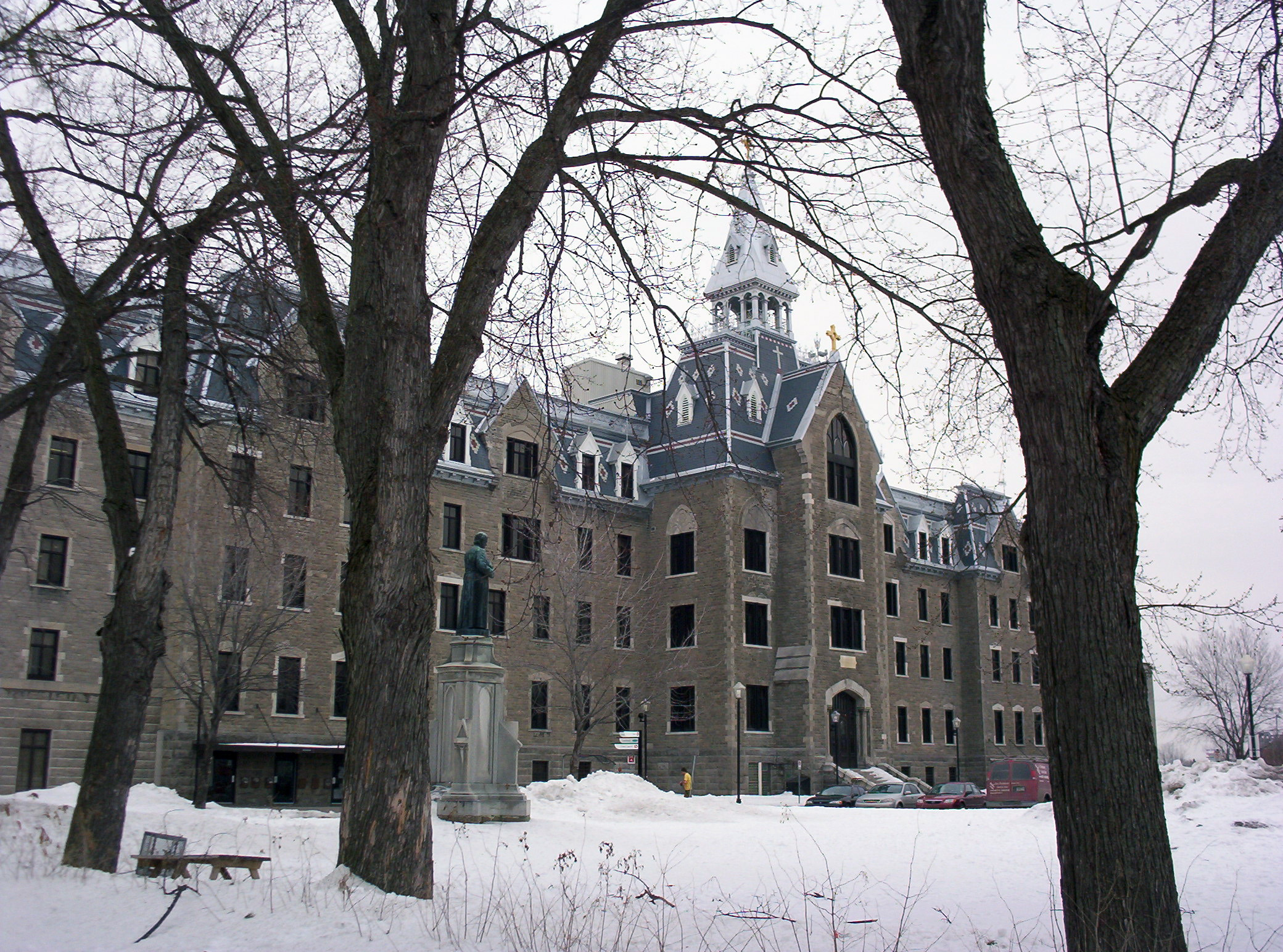 Collège Lionel-Groulx, entrée du Vieux séminaire de Sainte-Thérèse, au Québec (Canada)